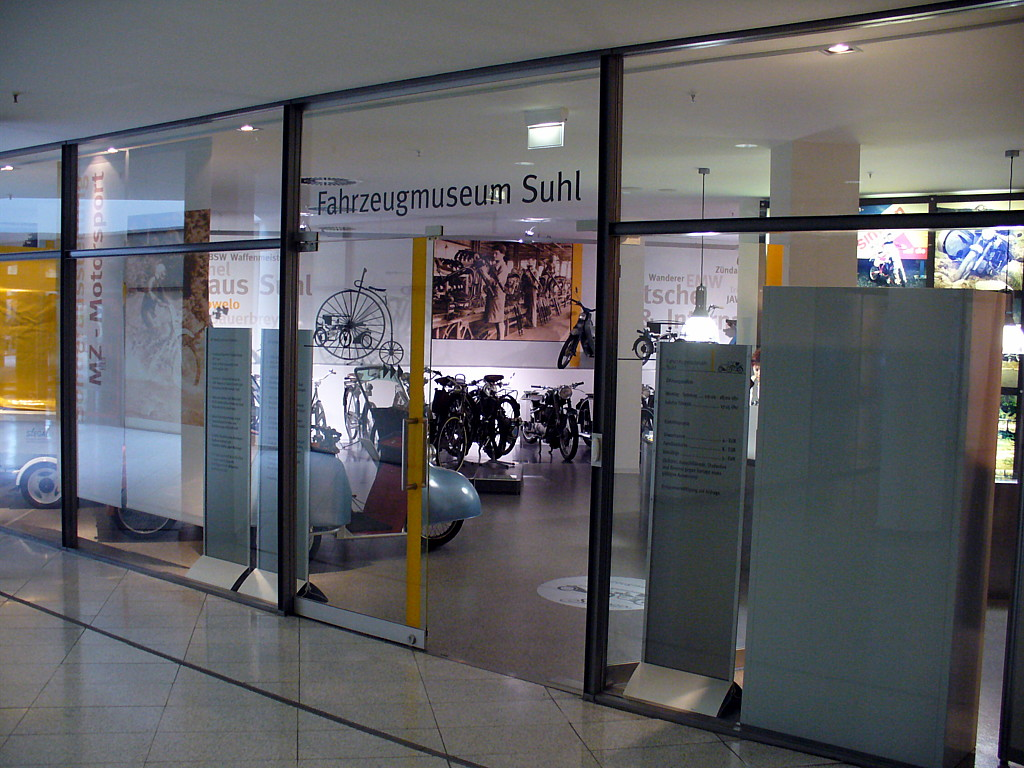 Fahrzeugmuseum Suhl CCS